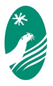 Logo du parc naturel régional de Millevaches en Limousin